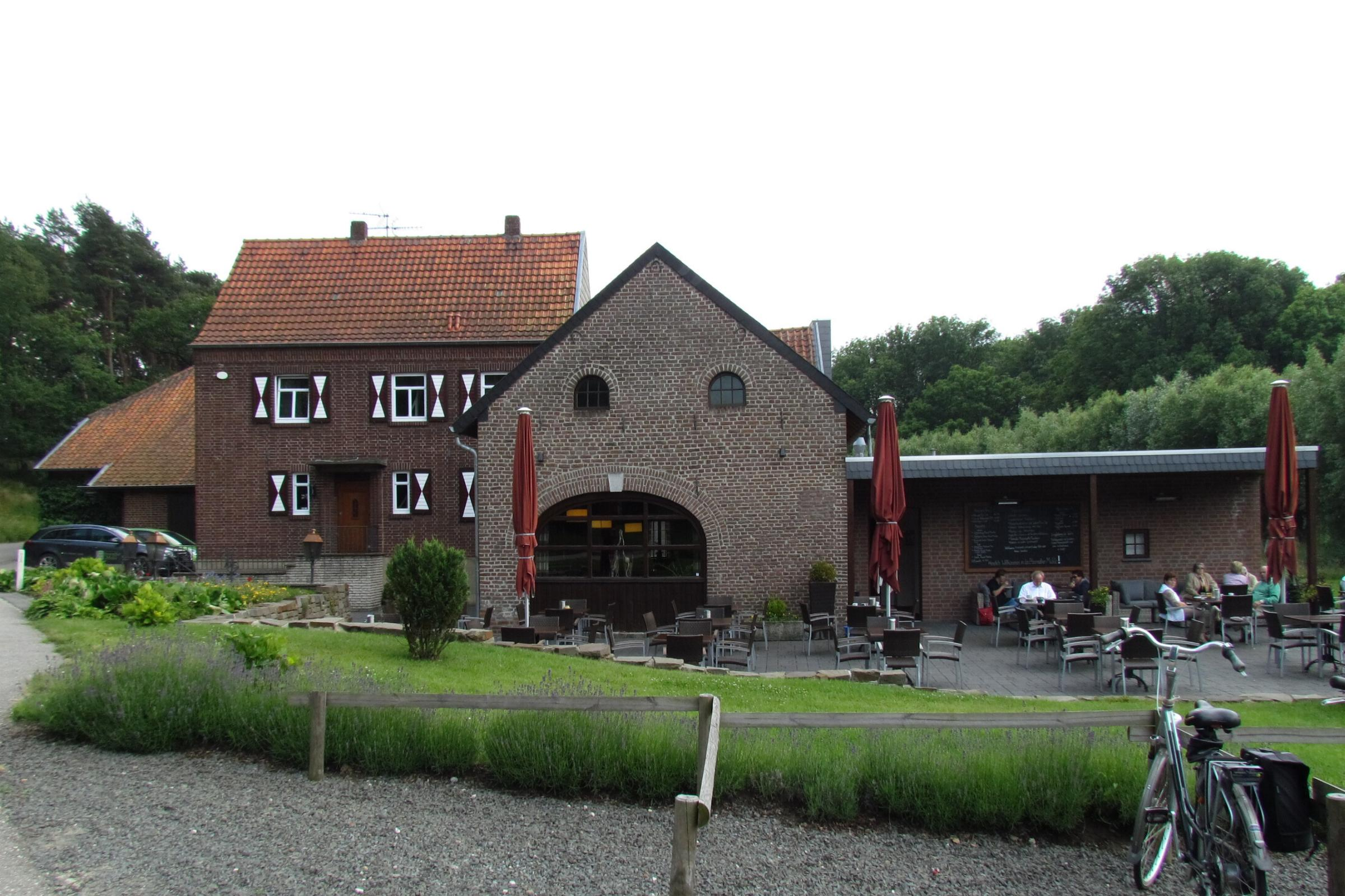 Gesamter Gebäudekomplex der Etzenrather Mühle